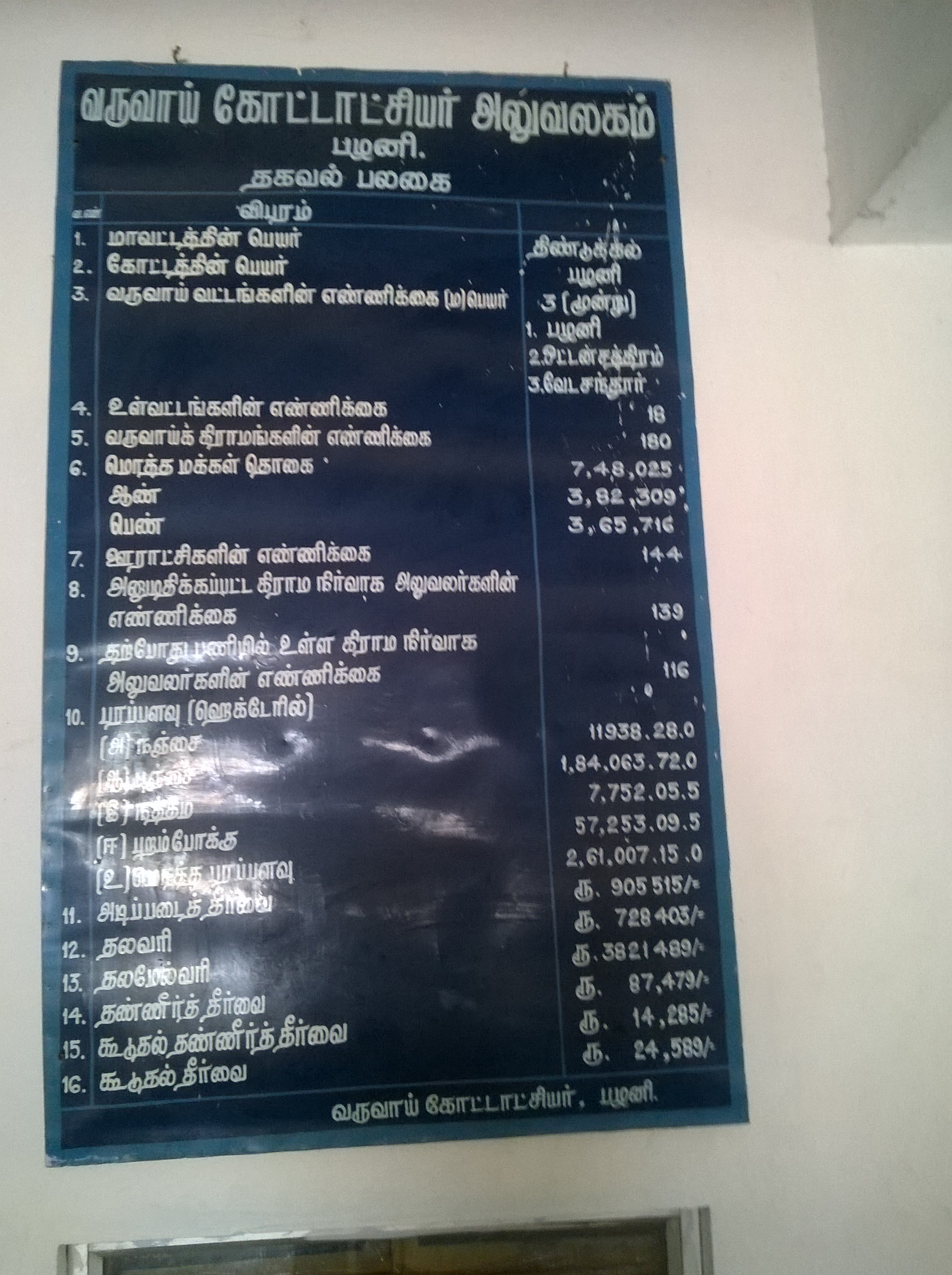 கட்டுரைக்கு